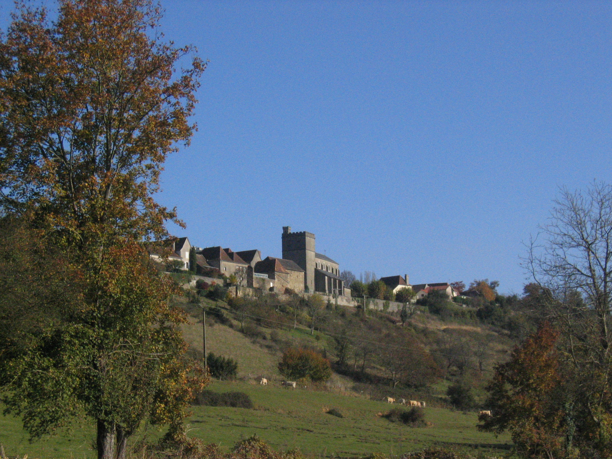 Village de Lagor dans les Pyrénées-Atlantiques.